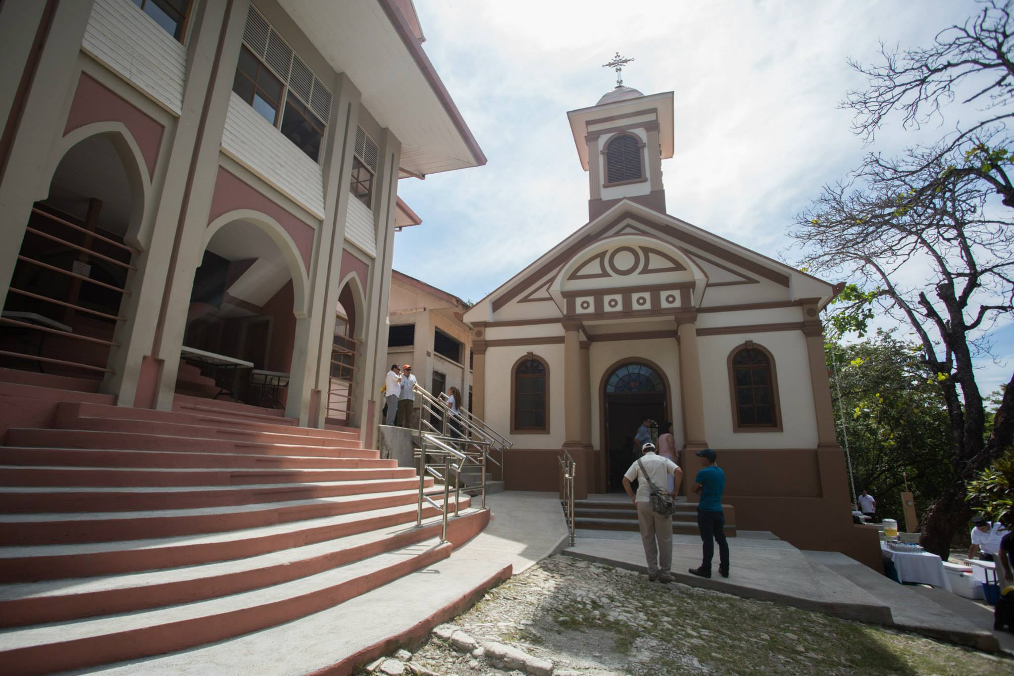 Capilla de la isla San Lucas, provincia de Puntarenas, Costa Rica.